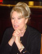 Zelf gemaakt op de Dutch Star Con.